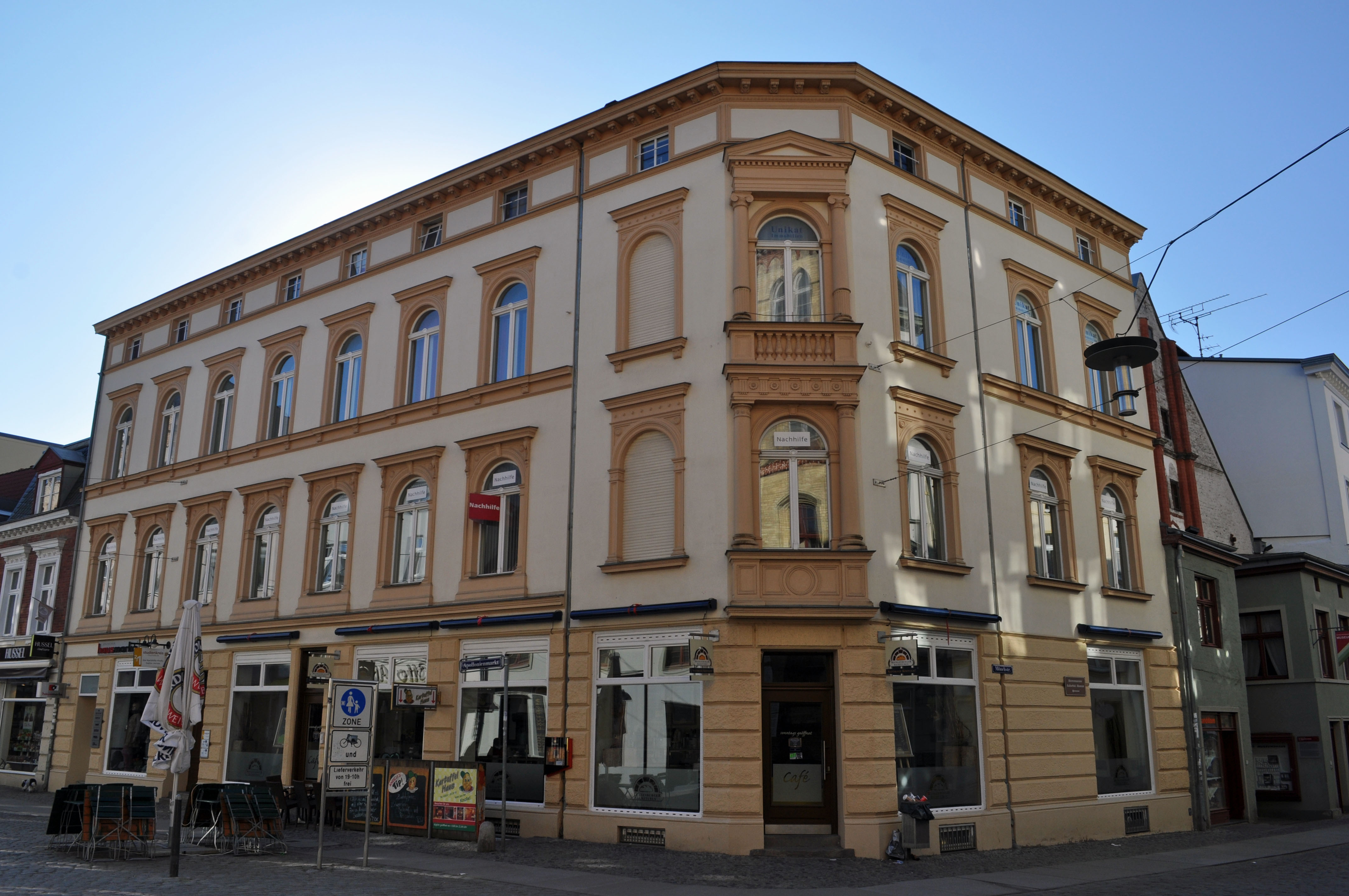 Gebäude bzw. Gebäudedetail in Stralsund. Straße und Hausnummer siehe Dateiname.